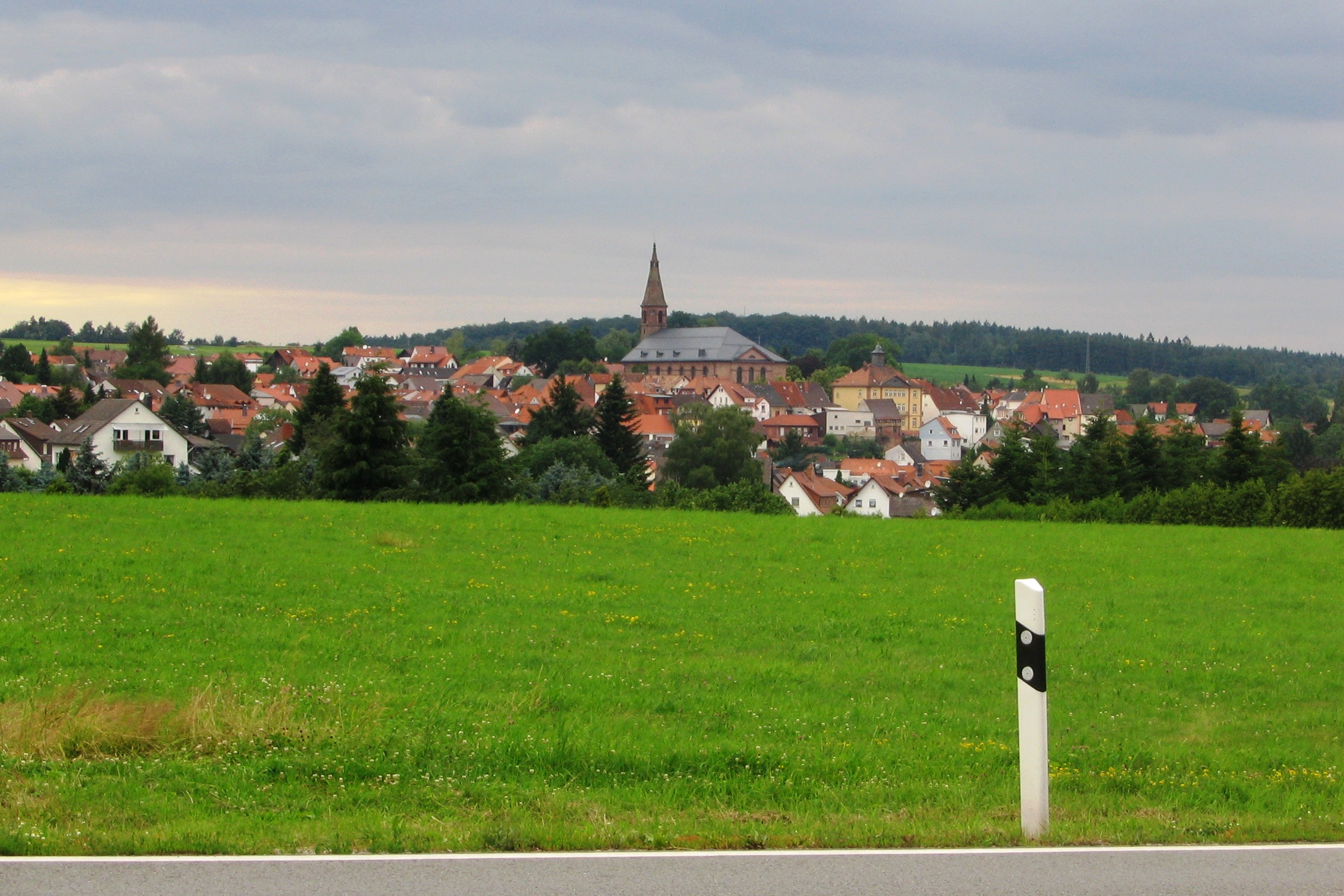 Blick von von der Ortsumgehung der Bundesstraße 45 im Osten auf Beerfelden. Martinskirche und Bürgerhaus prägen das Stadtbild.